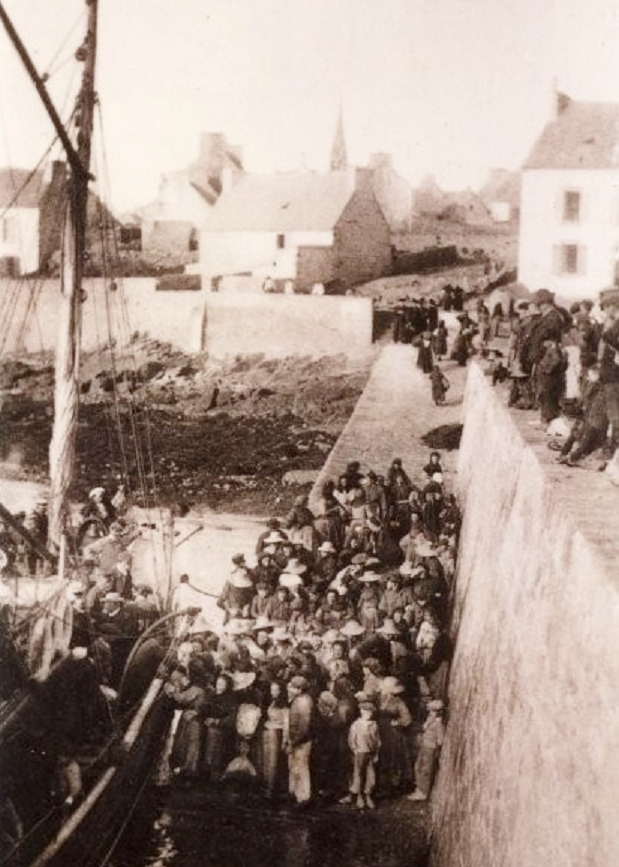 Le débarquement à Molène vers 1920 (carte postale Y. Bourlès, Pleyben)